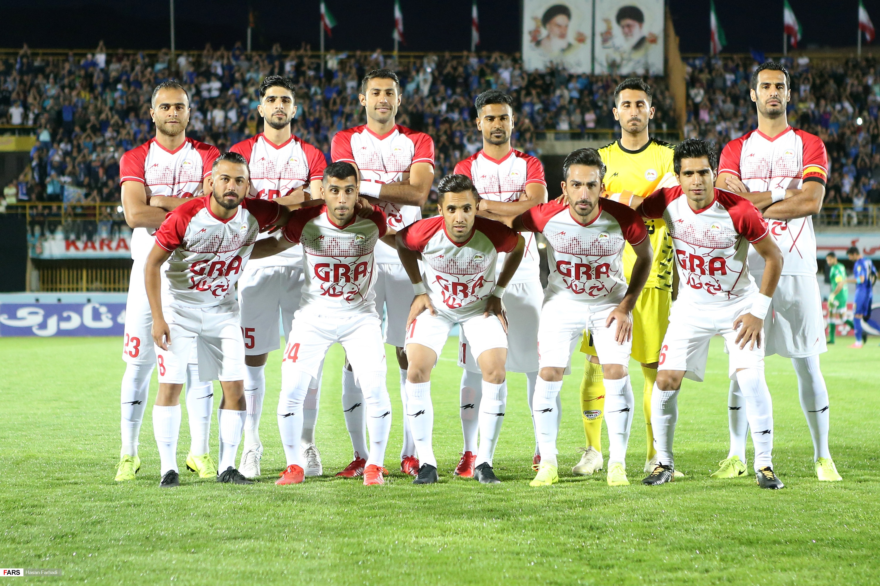 تصاویر برد استقلال مقابل گل ریحان در جام حذفی فوتبال کشور